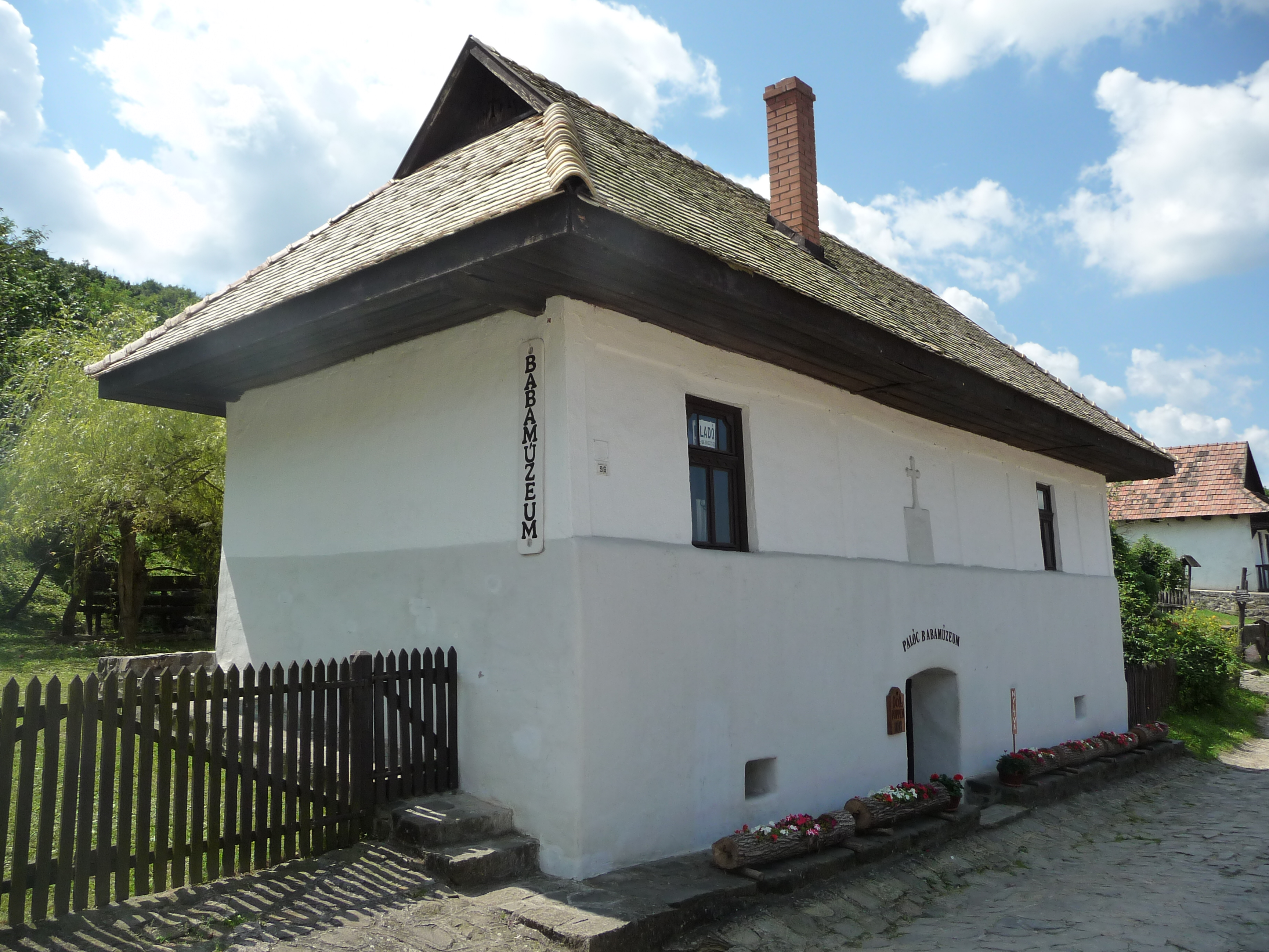 Hollókői babamúzeum, Kossuth u. 96.